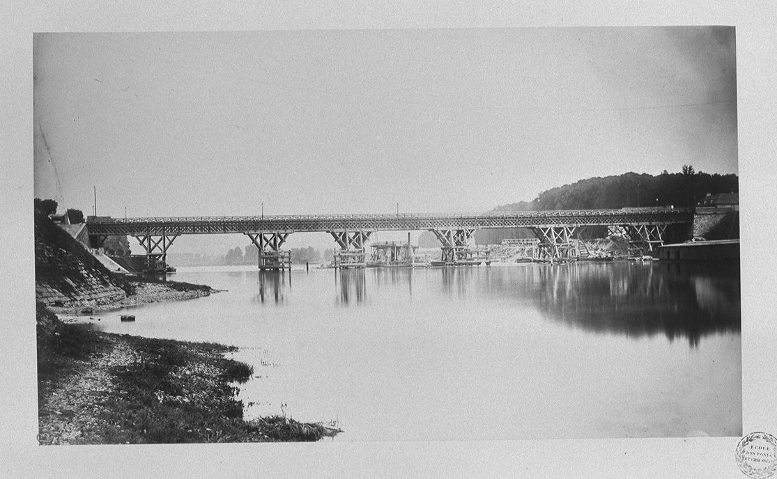 Pont provisoire en charpente construit en 1871 sur le bras navigable de la Seine à Mantes-la-Jolie (Yvelines, France). Vue prise d'amont, rive gauche